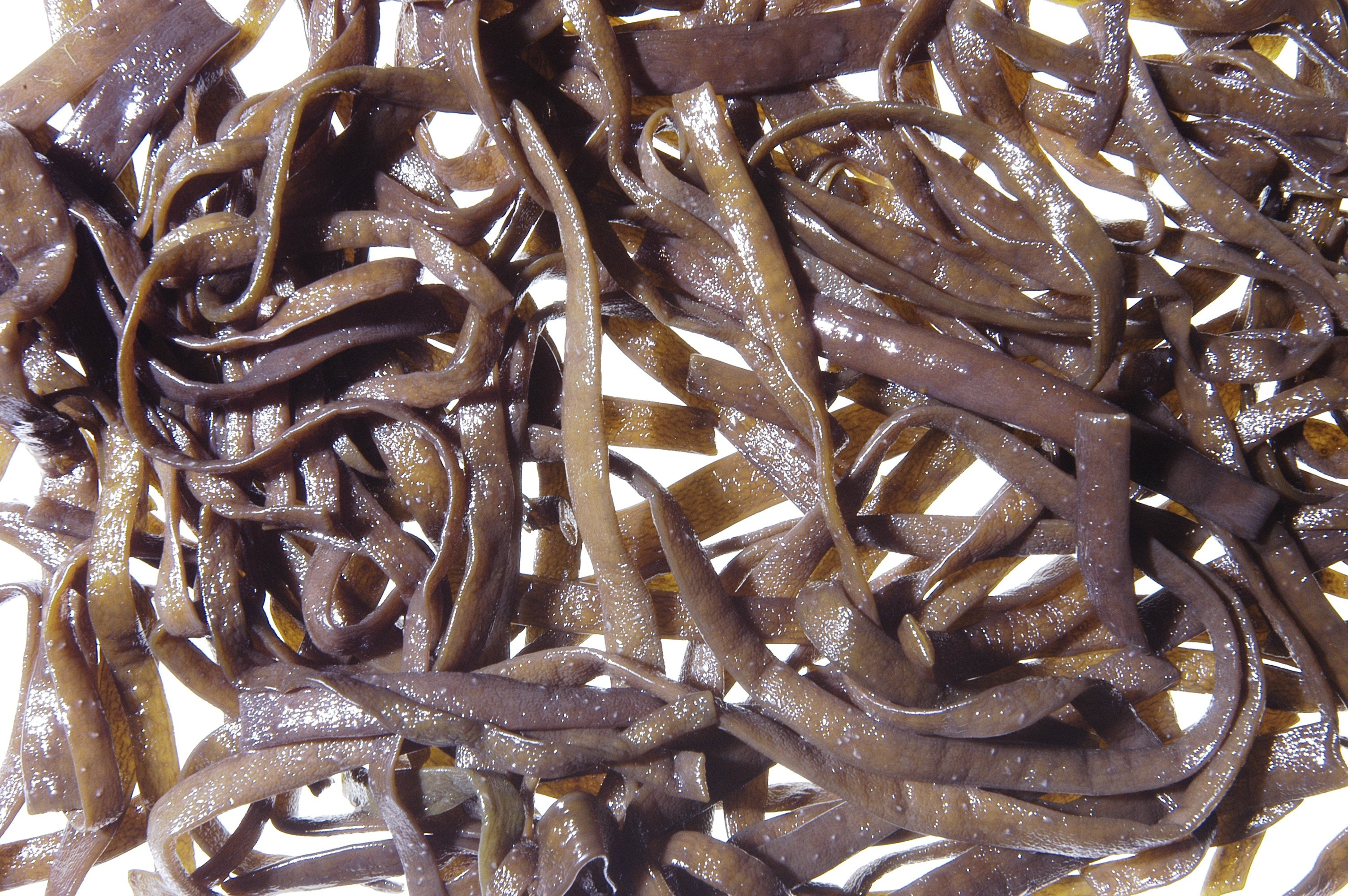 Zeespaghetti (Himanthalia elongata)